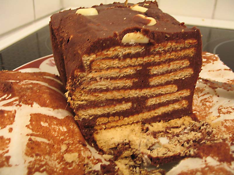 Abbildung von "Kalter Hund" bzw. Lukullus (Süßspeise)